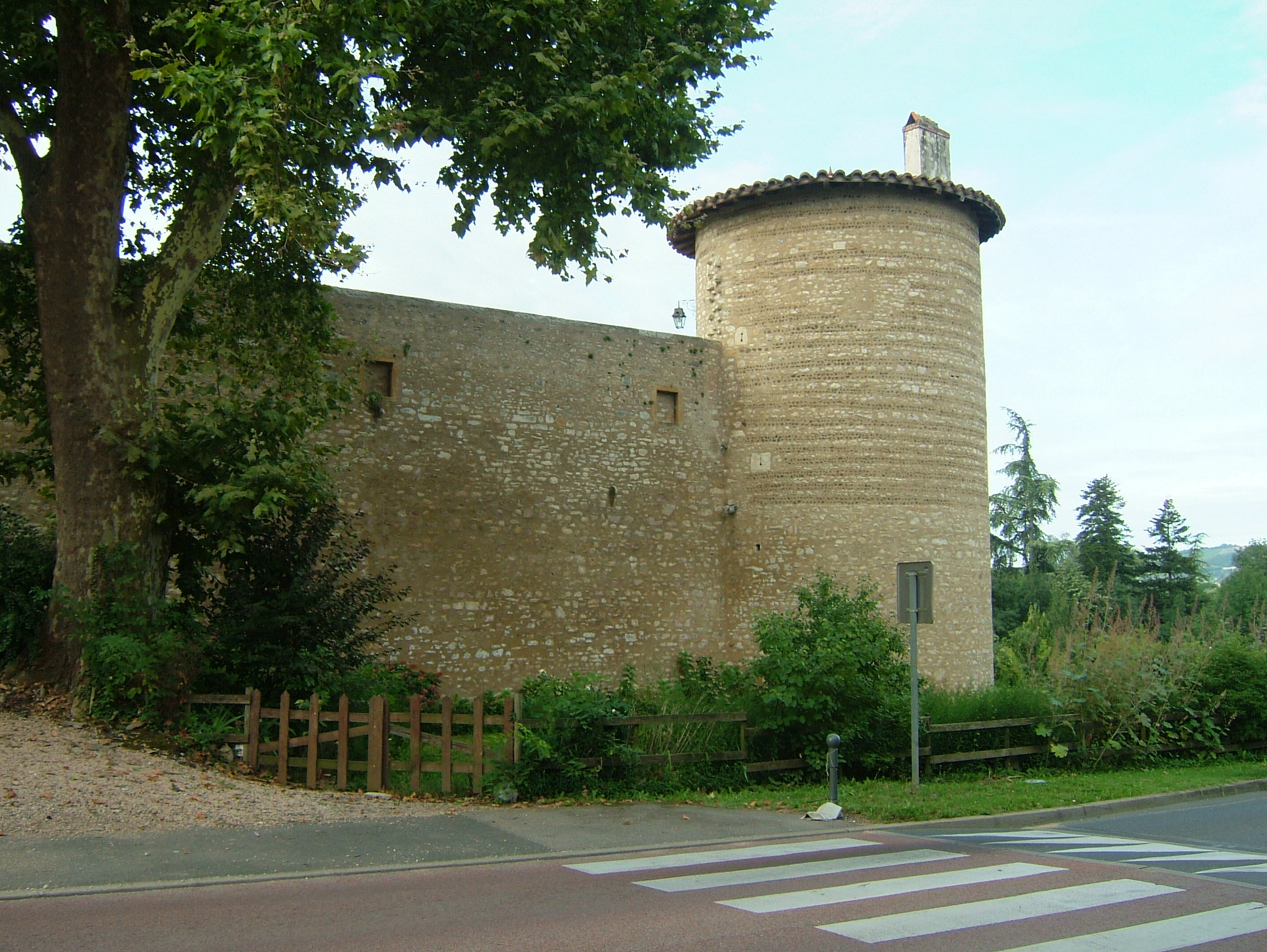 Propriété de Suzanne VALADON, mère du peintre Bernard UTRILLO